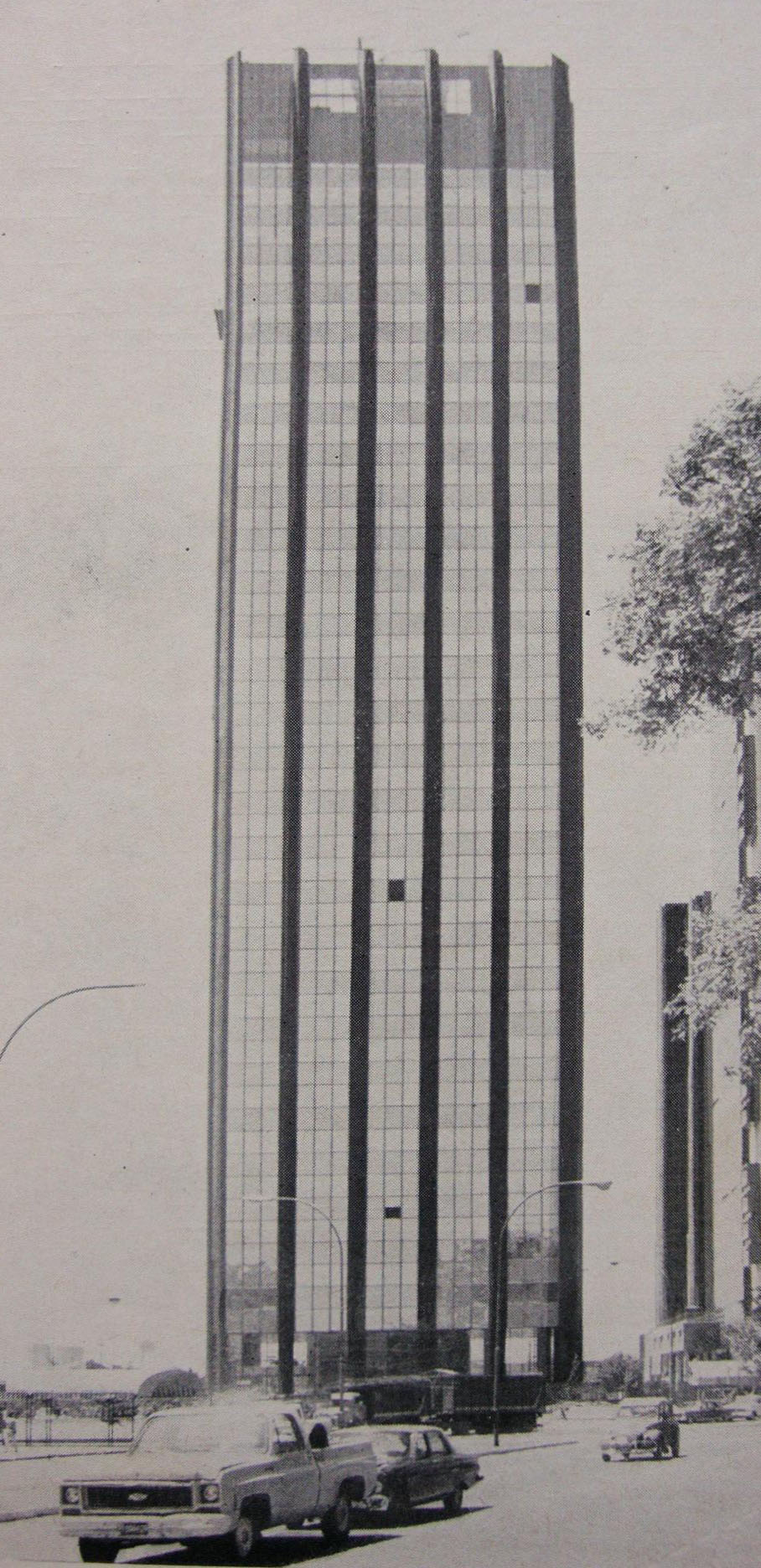 La Torre Catalinas Norte diseñada por el estudio de arquitectos Sanchez Elía, Peralta Ramos y Agostini (SEPRA) y construida en 1976. Complejo Catalinas Norte, barrio de Retiro. Buenos Aires, Argentina.